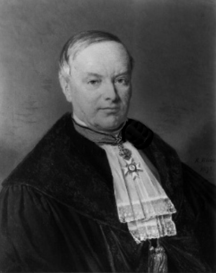 Carl Heinrich von Weizsäcker, Gemälde von R. Risse